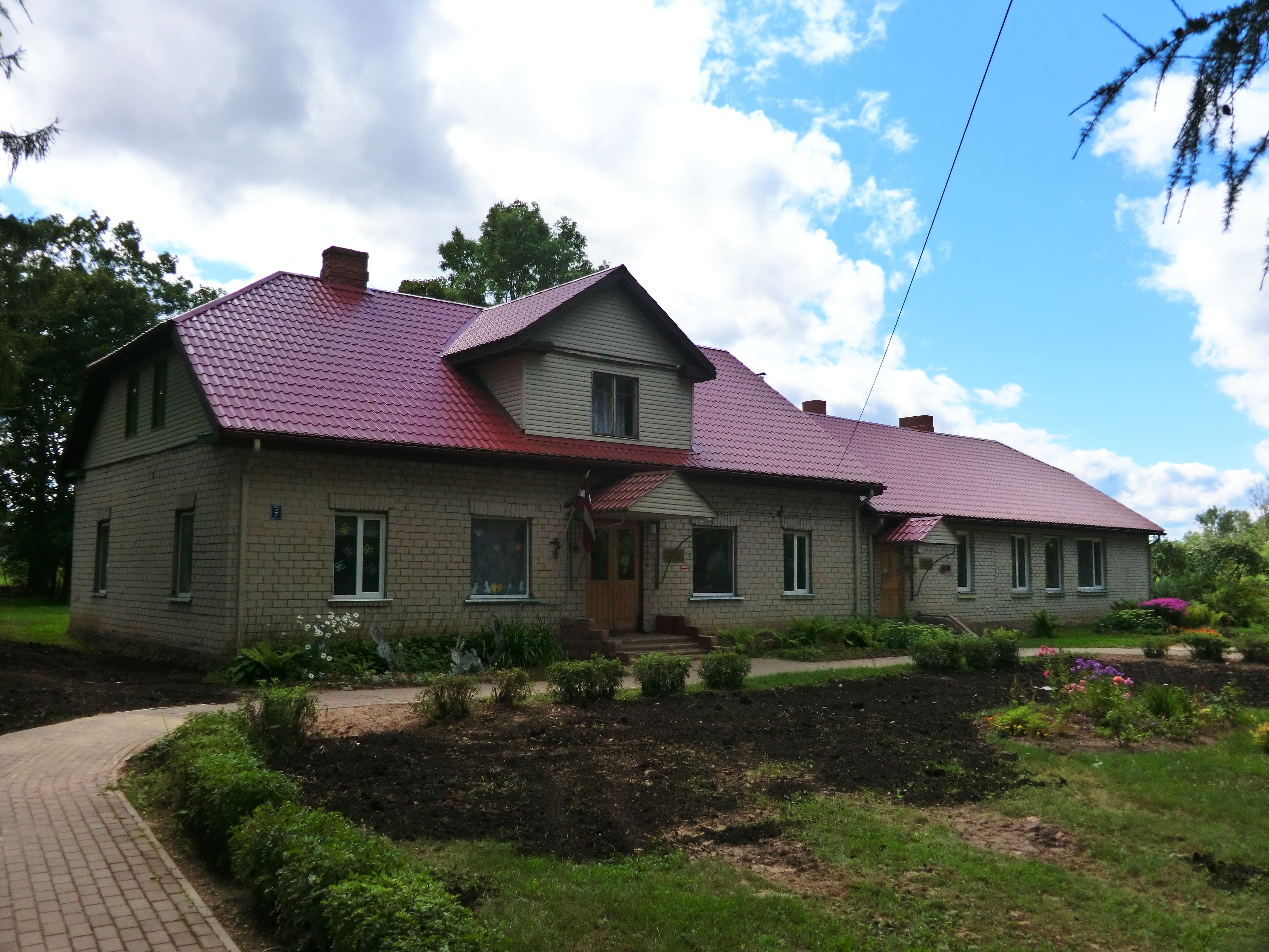 самоуправение и музей